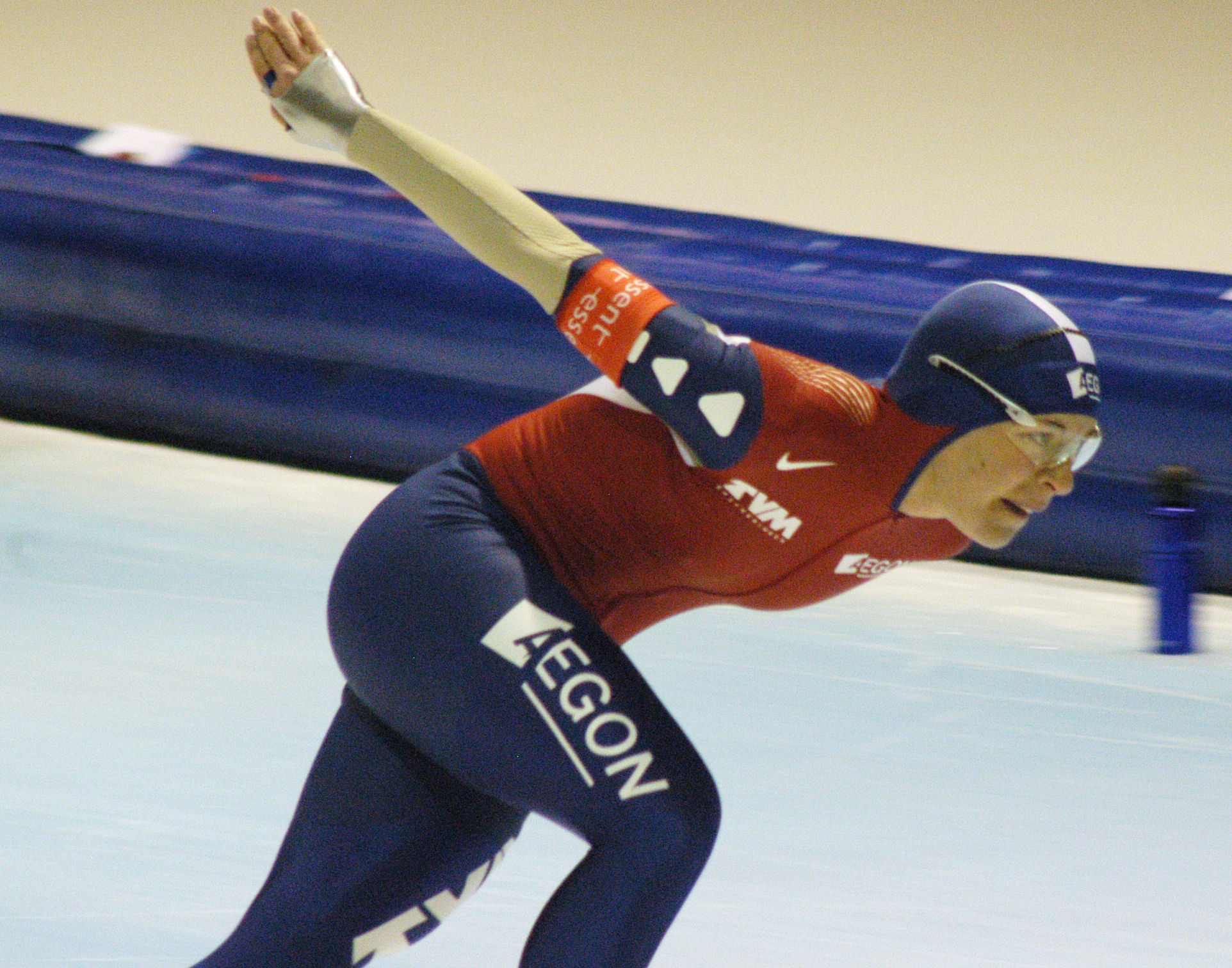 Paulien van Deutekom (NED) in action at a world cup speedskating in Heerenveen, the Netherlands.